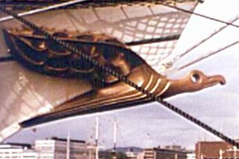 Beschreibung: Hafen und Rathaus Oslo, im Vordergrund das deutsche Segelschulschiff Gorch Fock (2) Fotograf: presse03, selbst fotografiert, Sommer 1975 Lizenz: GNU-FDL